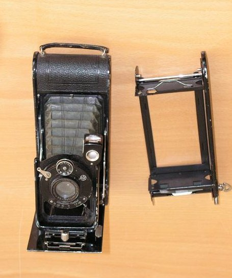 Plåtkamera bälgkamera etc Foto Stefan Linder